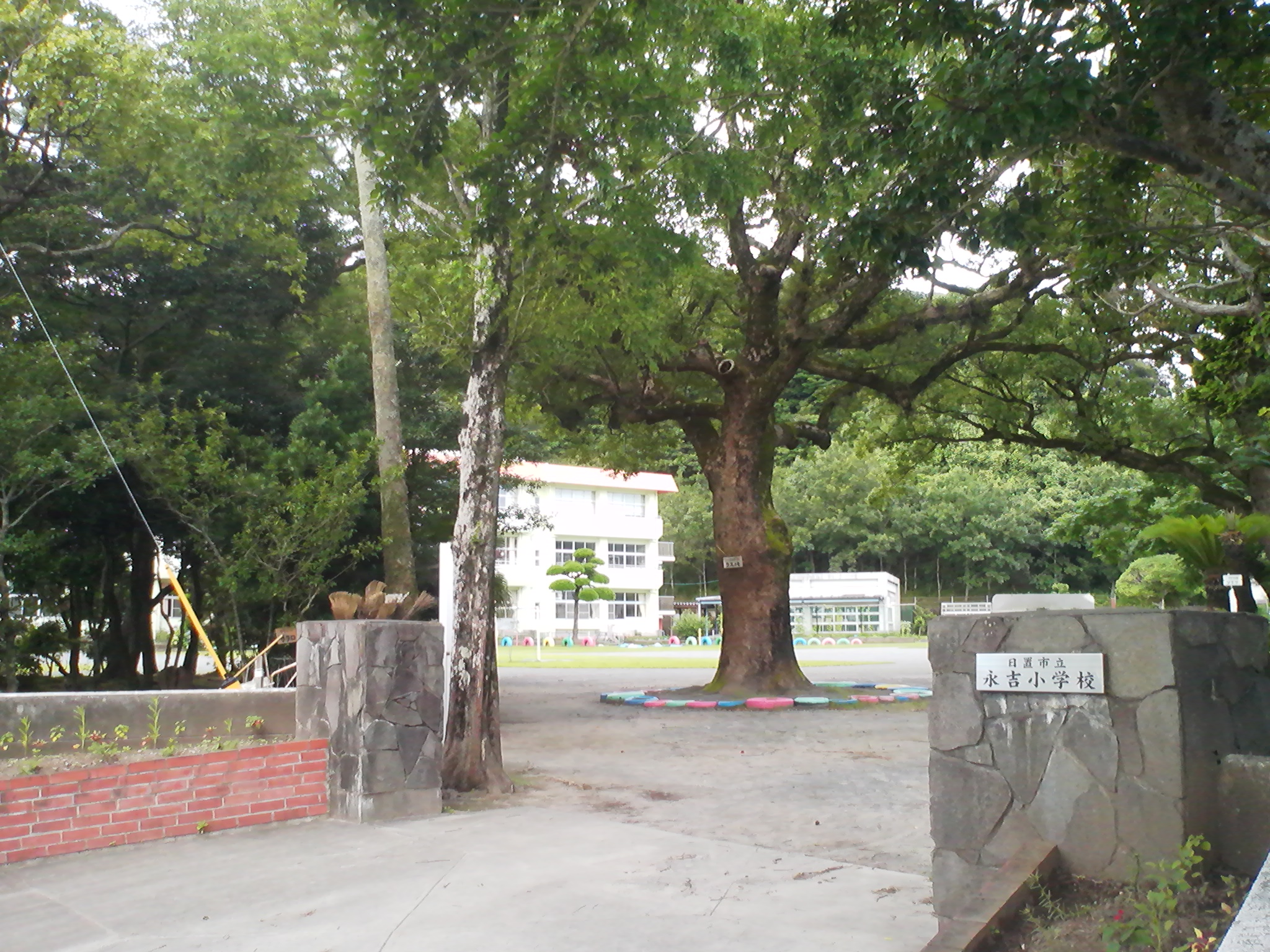 日置市立永吉小学校の外観。